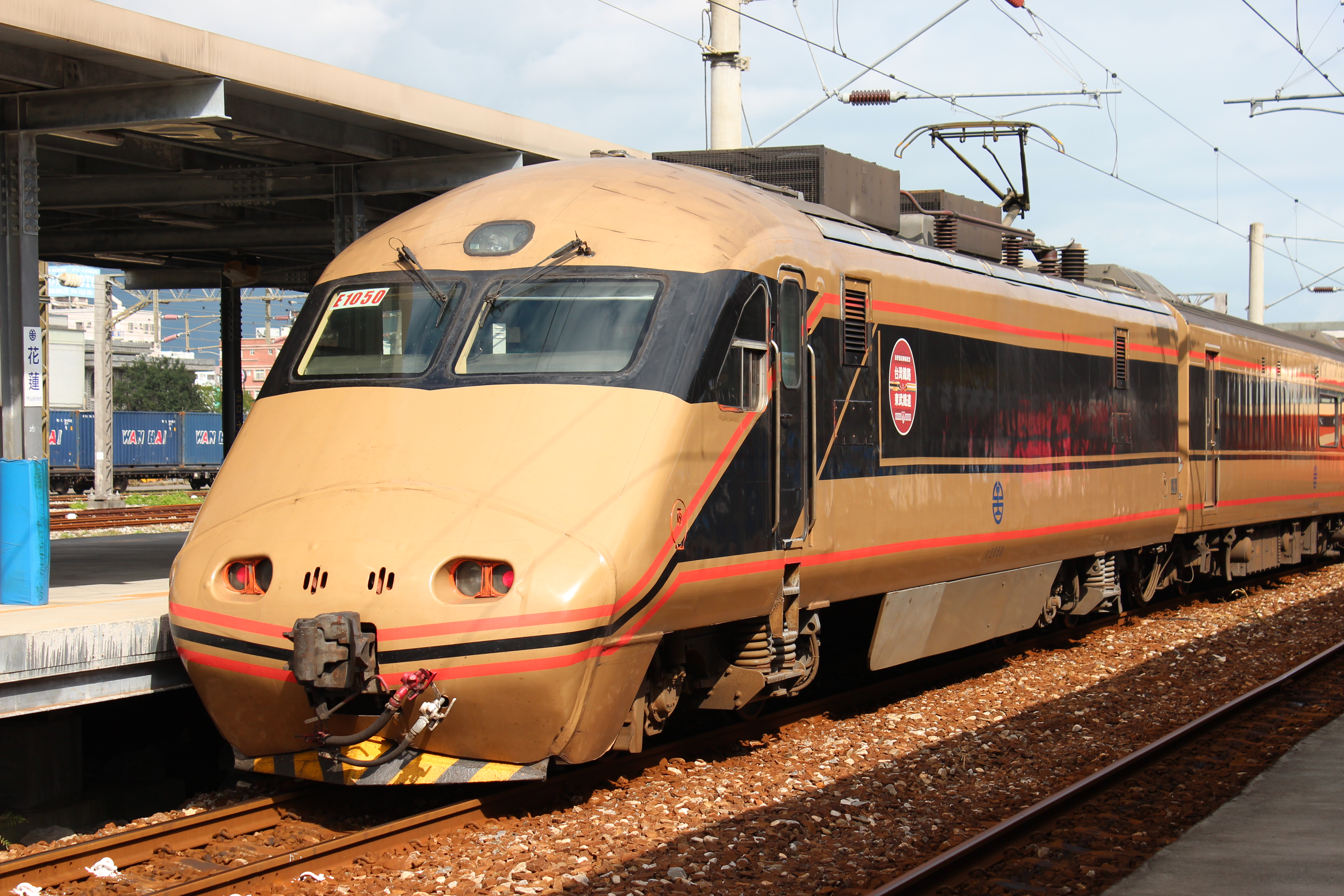 台湾鉄路管理局E1000型電車 日光詣スペーシアデザインラッピング編成 台湾鉄路管理局花蓮駅にて撮影